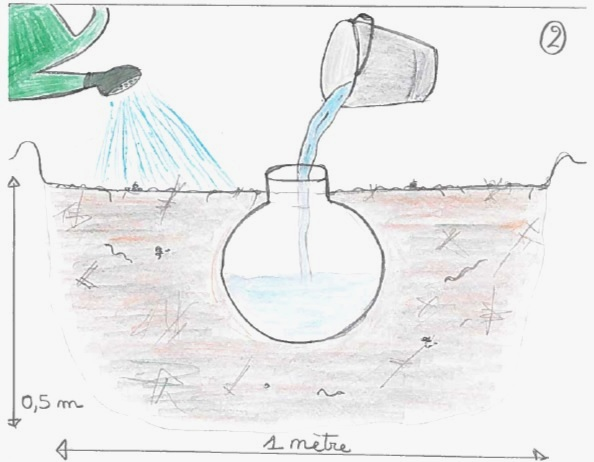 Premier arrosage/remplissage lors de l'installation